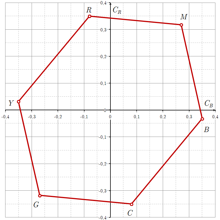 Chrominance Rec 709 01